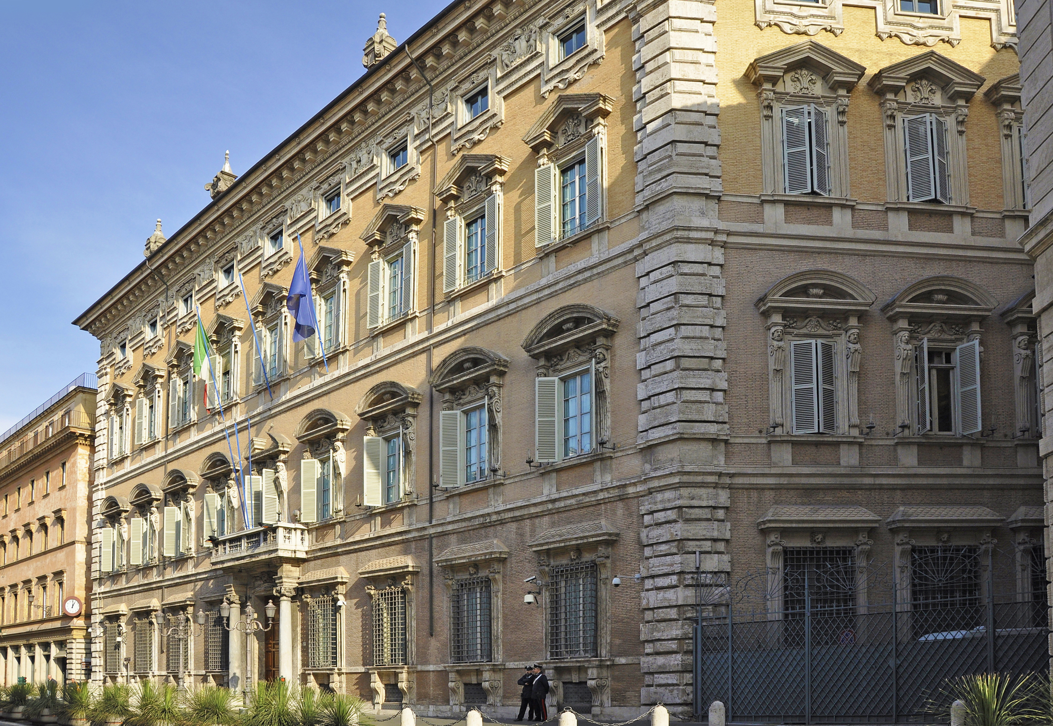 Palazzo Madama in Rome